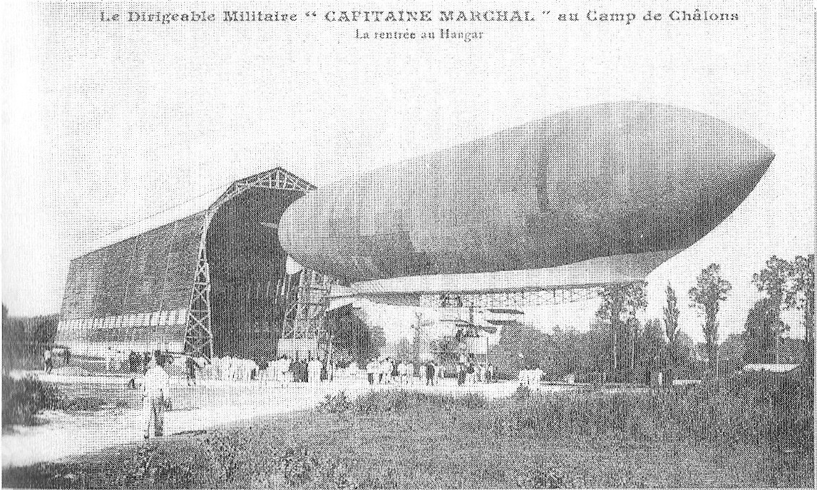 Le dirigeable Capitaine_Marchal, victime de la catastrophe du République,_camp_de_Châlons.